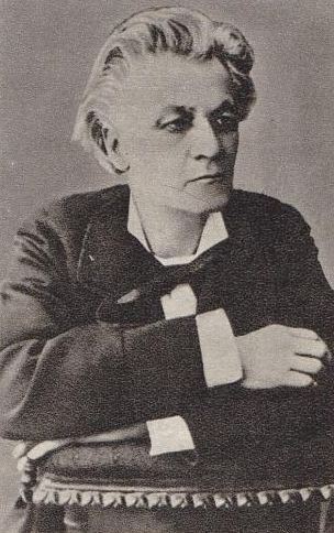 Viorel Cosma, Elena Teodorini,Editura Muzicala, 1962